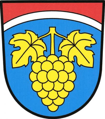 Hroznatín znak